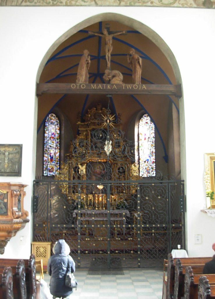 Barokowa krata w łuku tęczowym w kościele klarysek